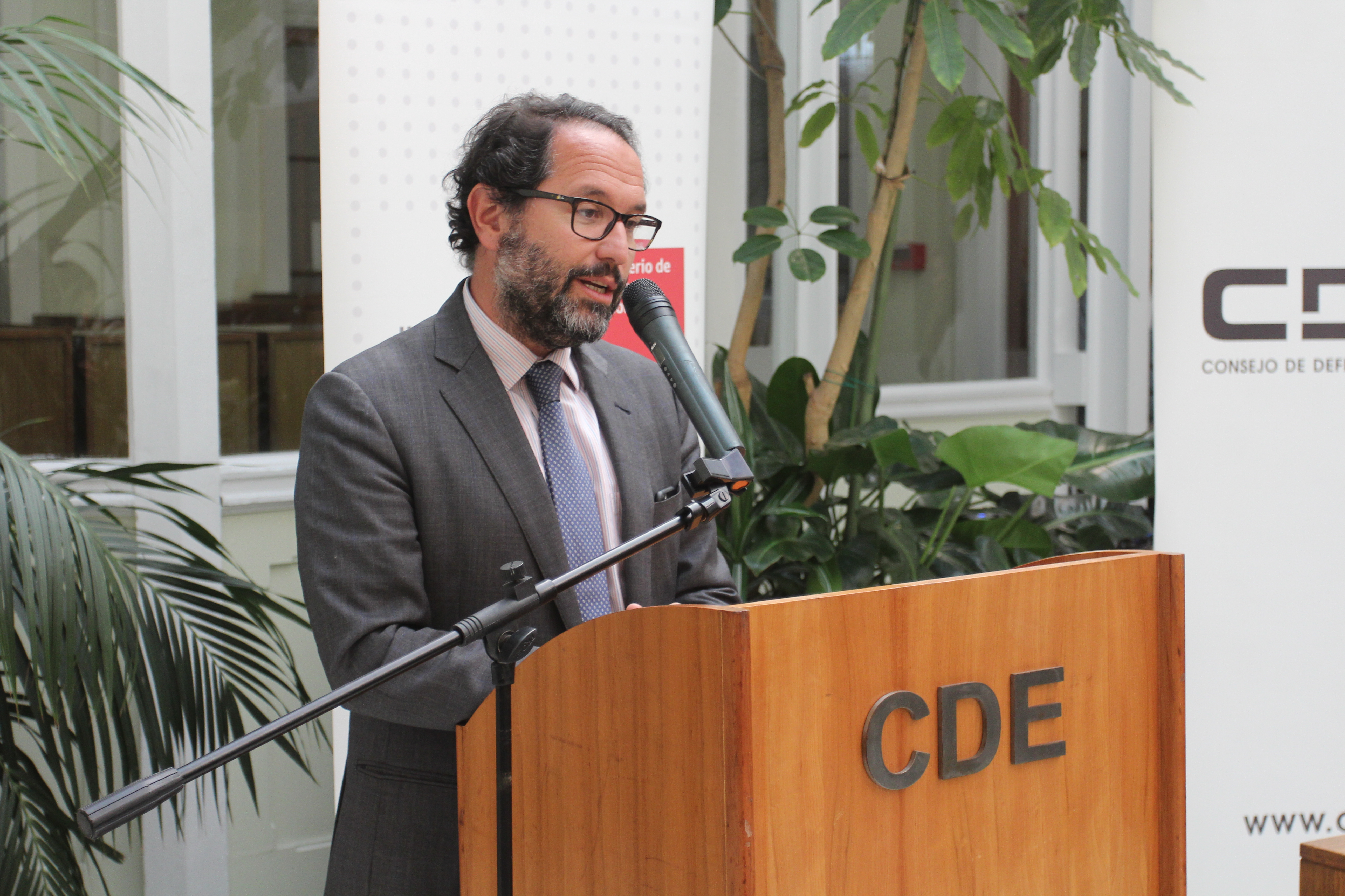 Bienes Nacionales entrega permiso de ocupación a Consejo de Defensa del Estado